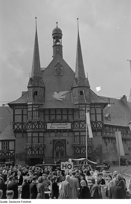 Original image description from the Deutsche Fotothek Vorderansicht des Rathauses